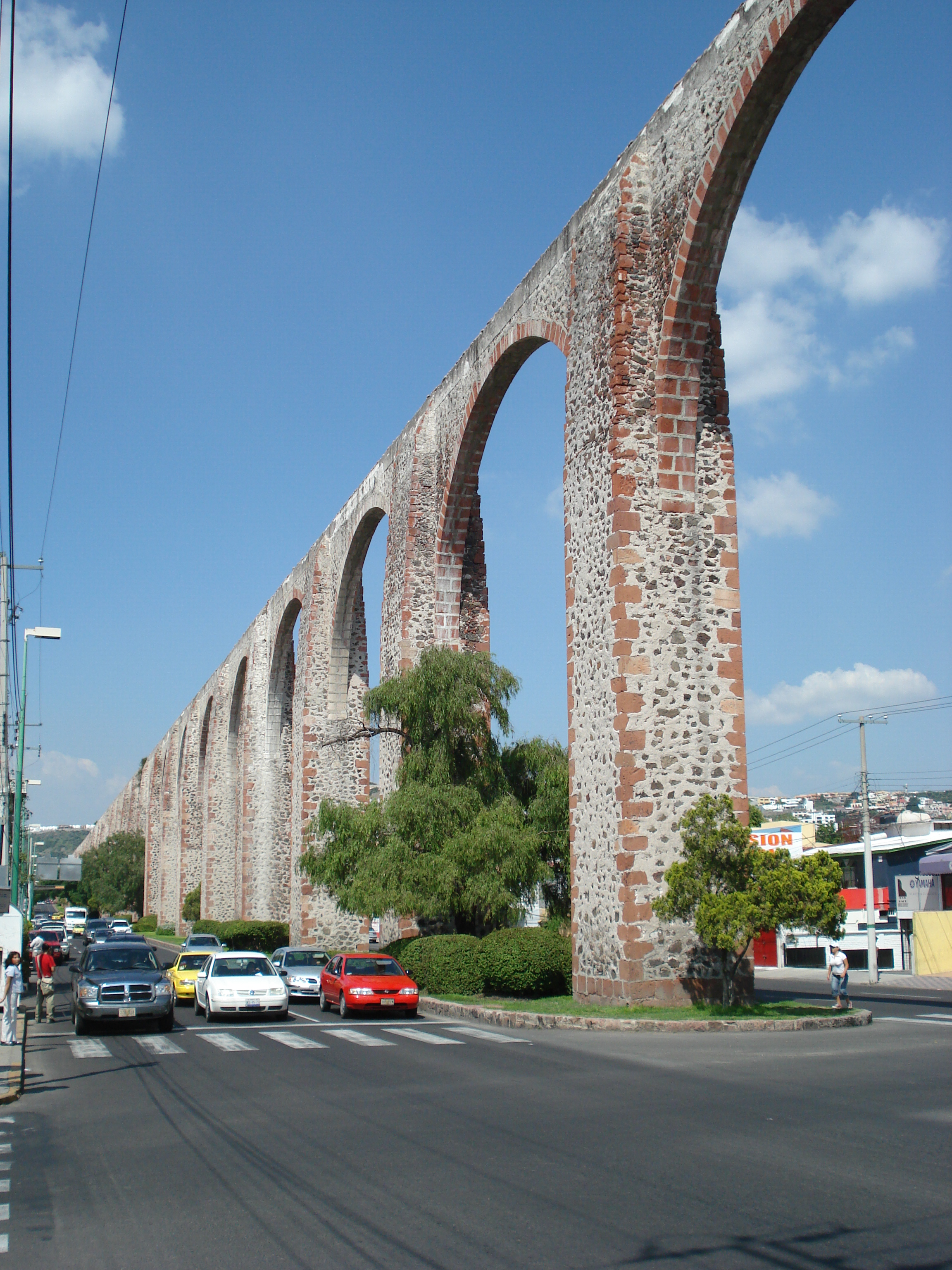 Acueducto